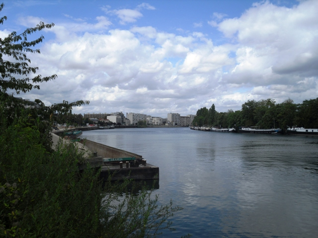 La Seine à Viry-Châtillon (91)